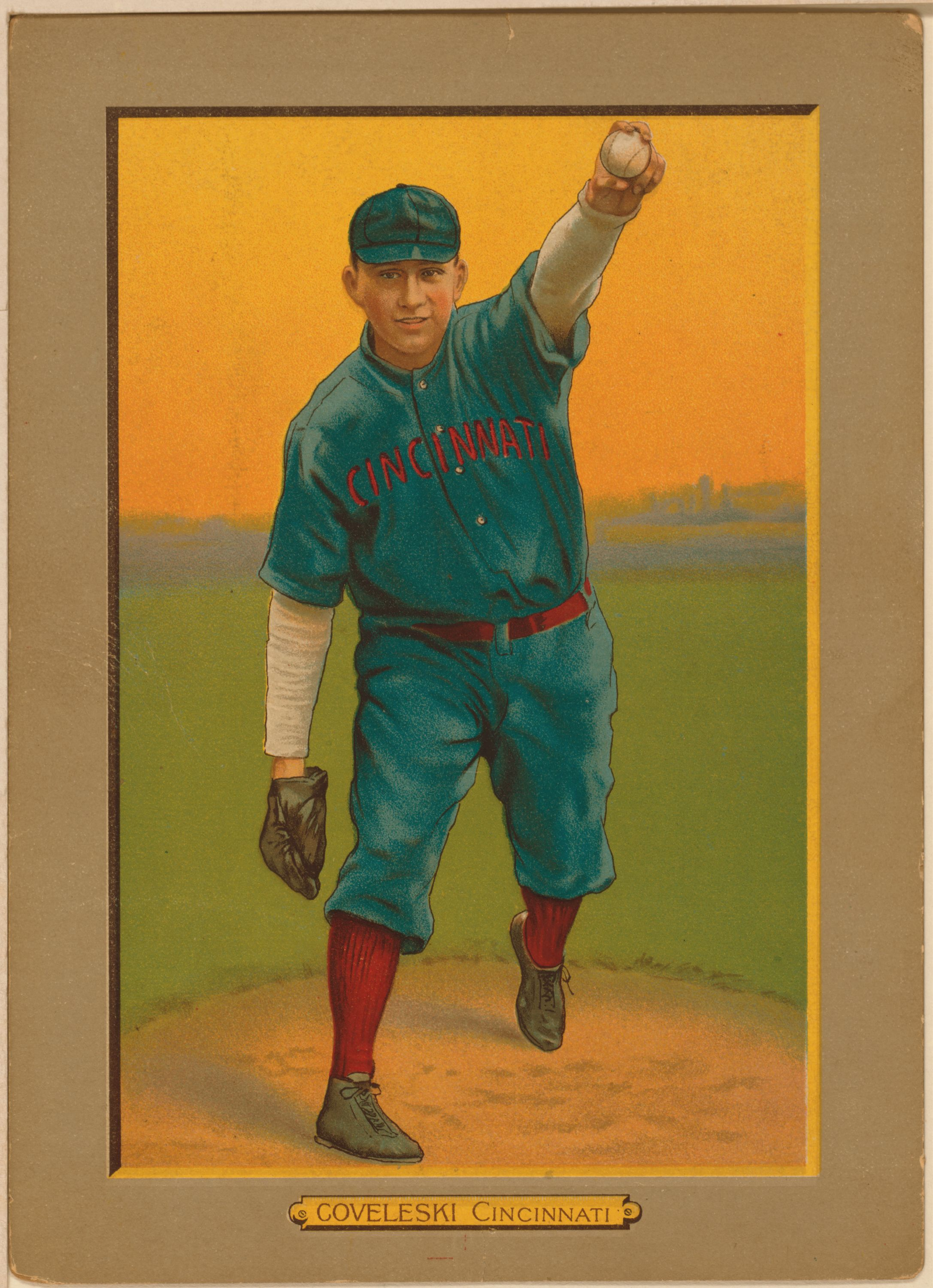 Harry Coveleski